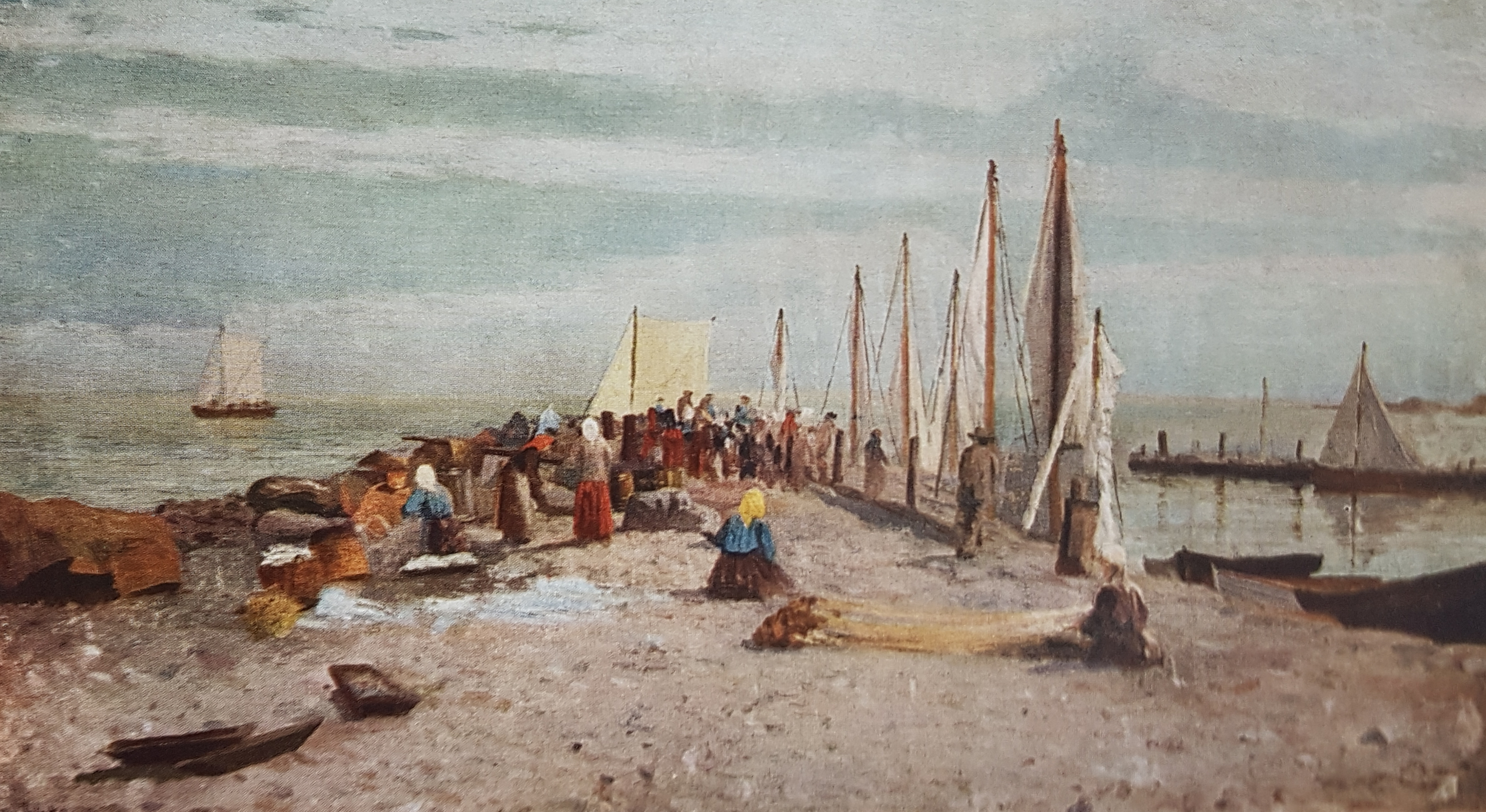 Arilds brygga målad Olof Krumlinde, avfotograferad bild från Allhems Svenskt konstnärslexikon.